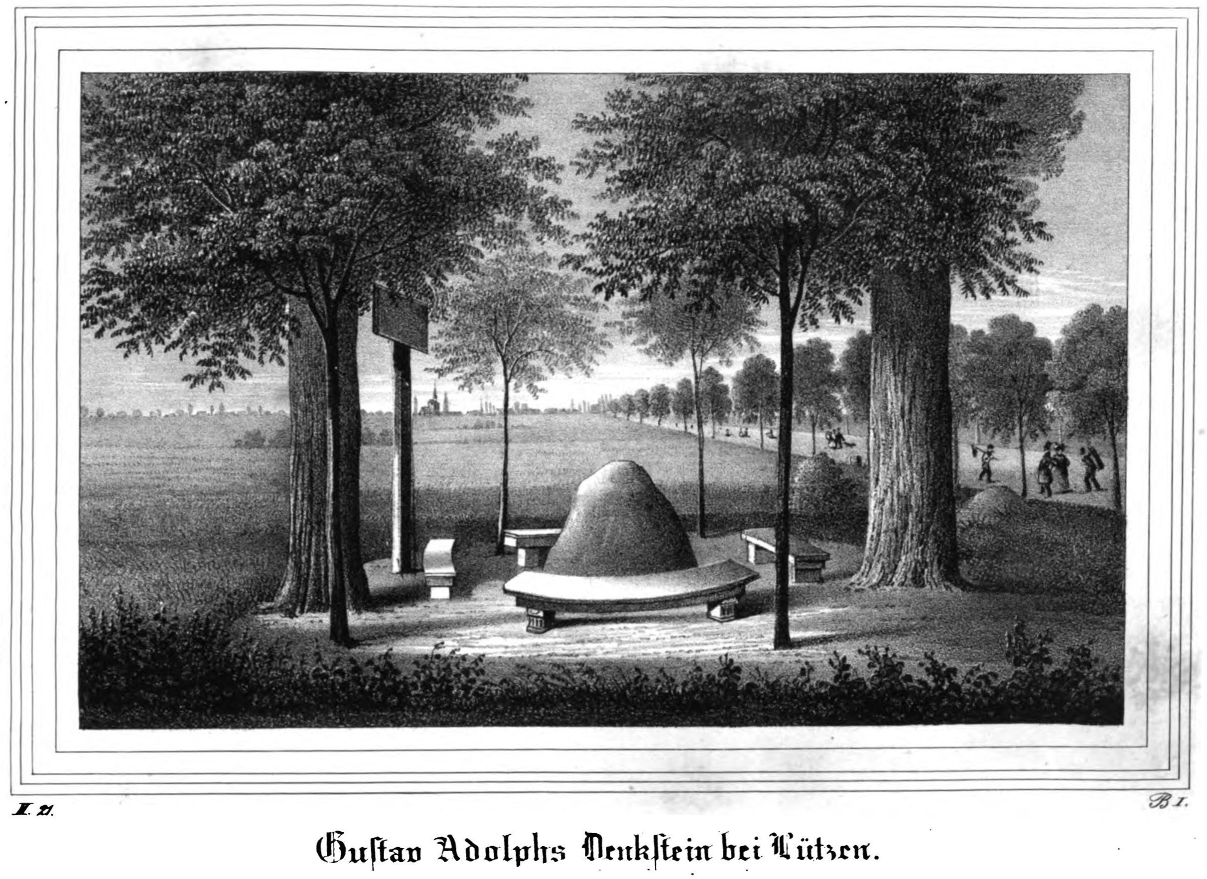 Saxonia Museum für saechsische Vaterlandskunde. Band 2. Dresden: Pietzsch und Comp. Siehe File:Saxonia Museum für saechsische Vaterlandskunde II.djvu